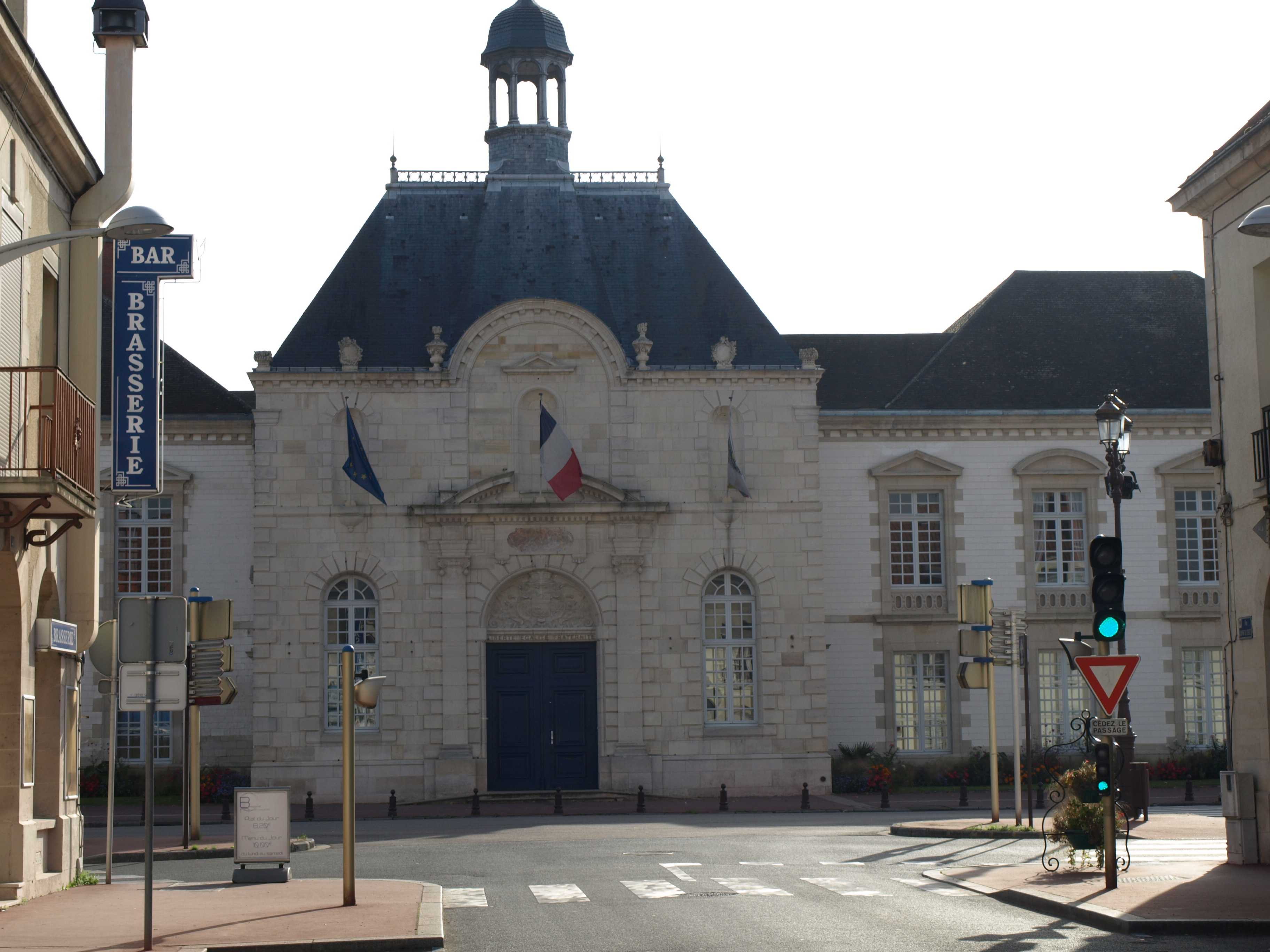 Vitry-le-François (51300 - FRANCE) : photographies Vitry-le-François (51300 - FRANCE) : Hôtel de ville (façade)